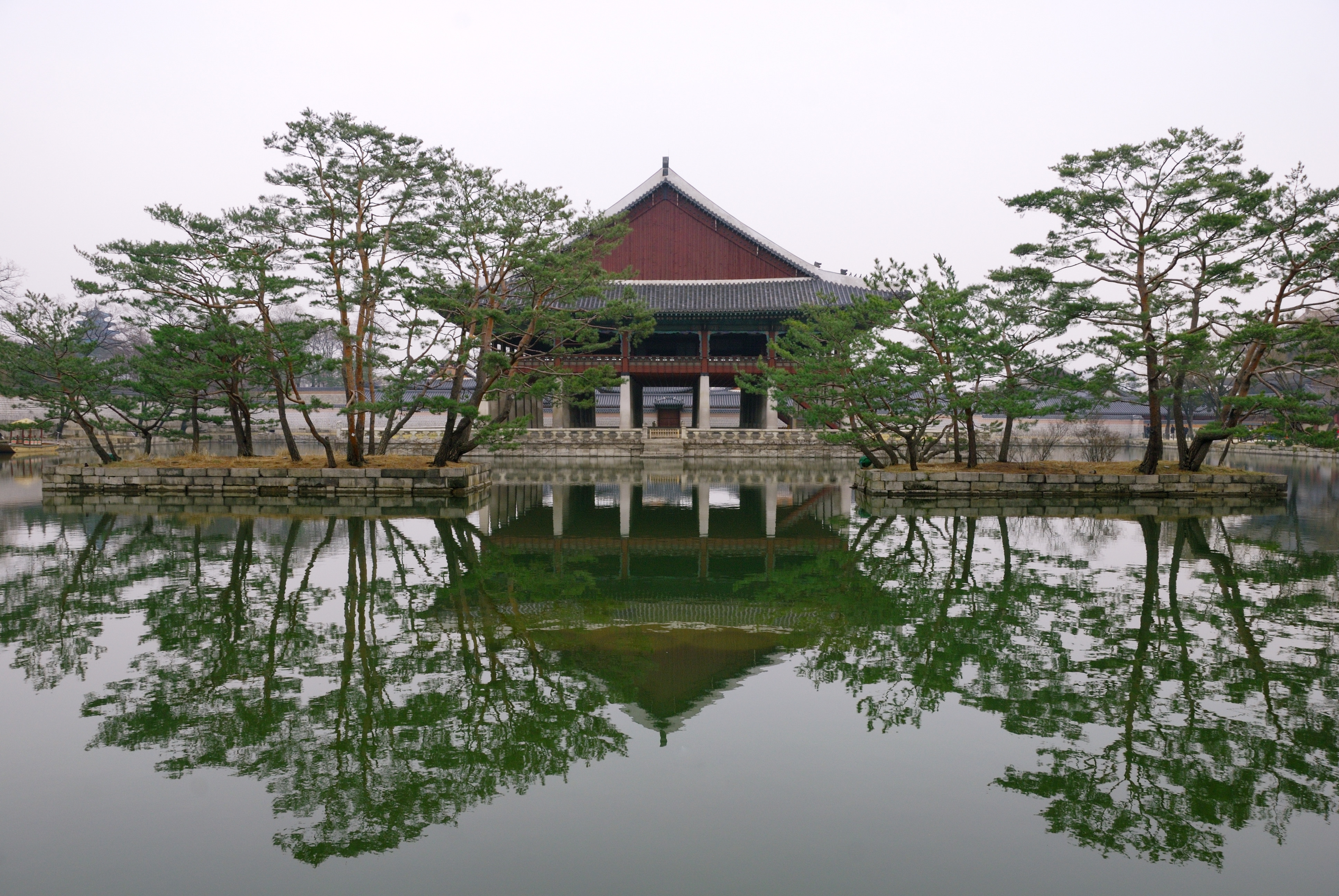 Gyeonghoeru